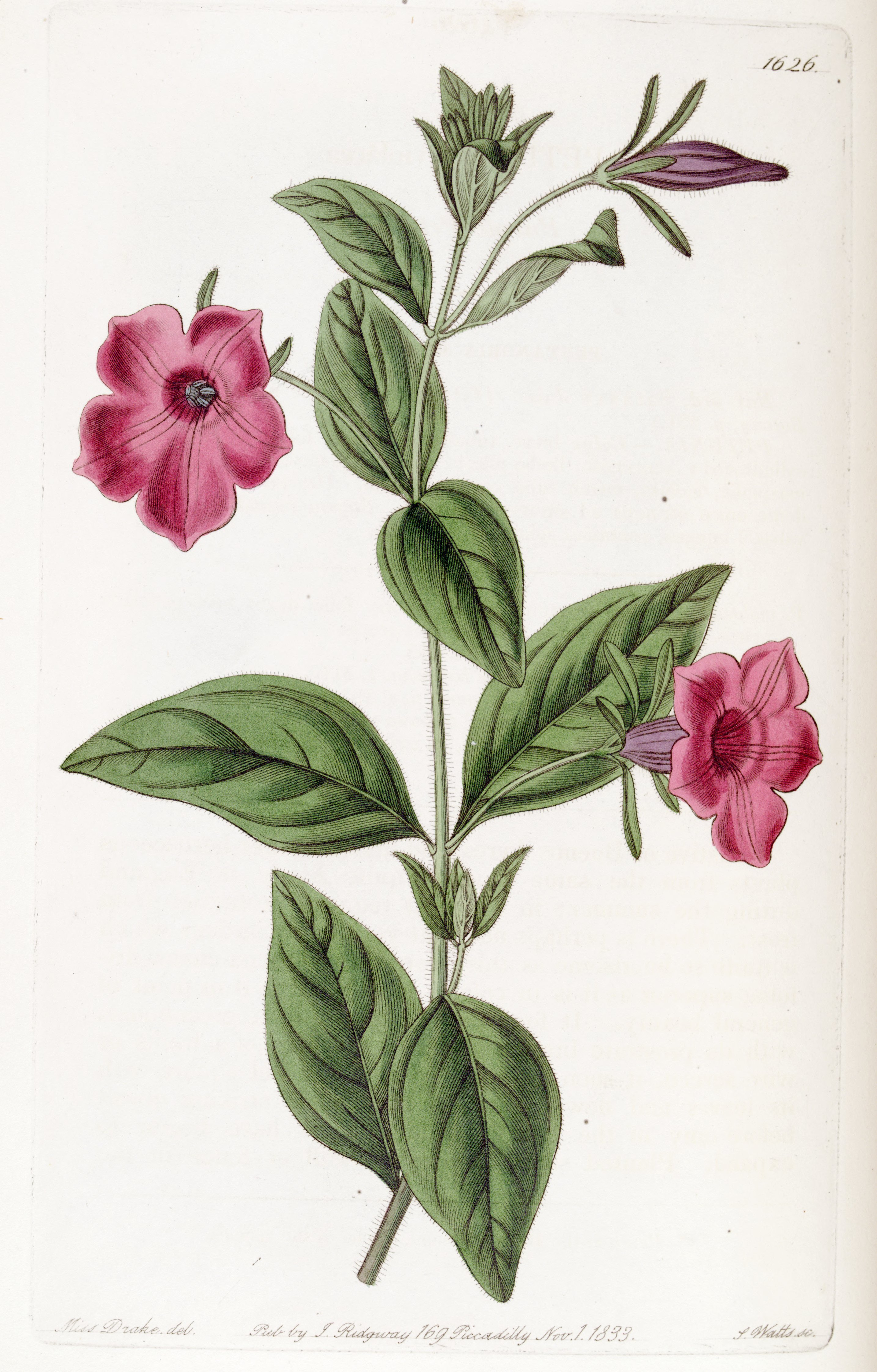 Petunia integrifolia (syn. Petunia violacea)